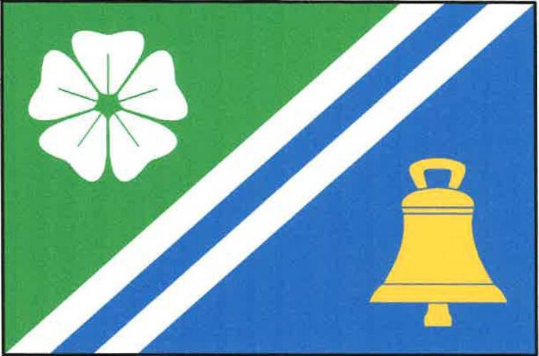 vlajka, Libňatov, okres Trutnov